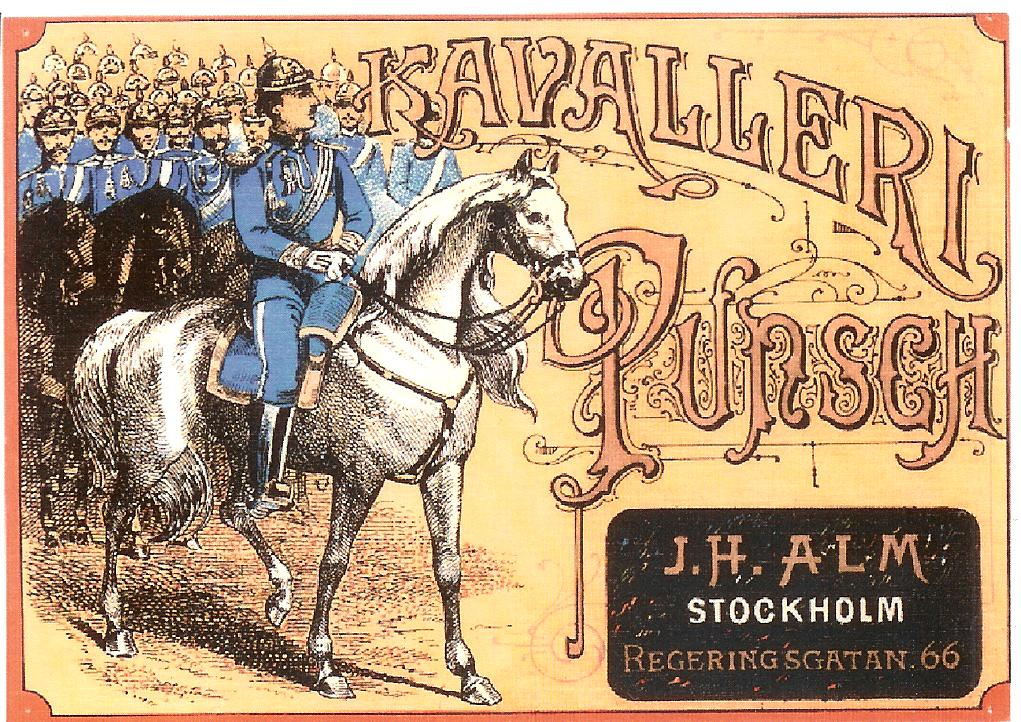 Etikett från en gammal punschflaska.